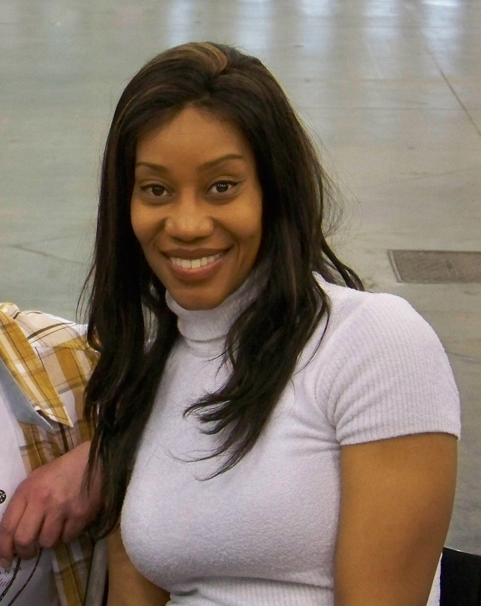 On est arriver vers 18 heures, alors ca a etait assez rapide pour passer pour les photos et autographes